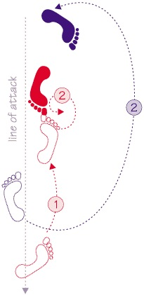 irimi tenkan, tai sabaki